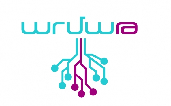 Արամթ ինժեներական լաբորատորիաների տարբերանշանը